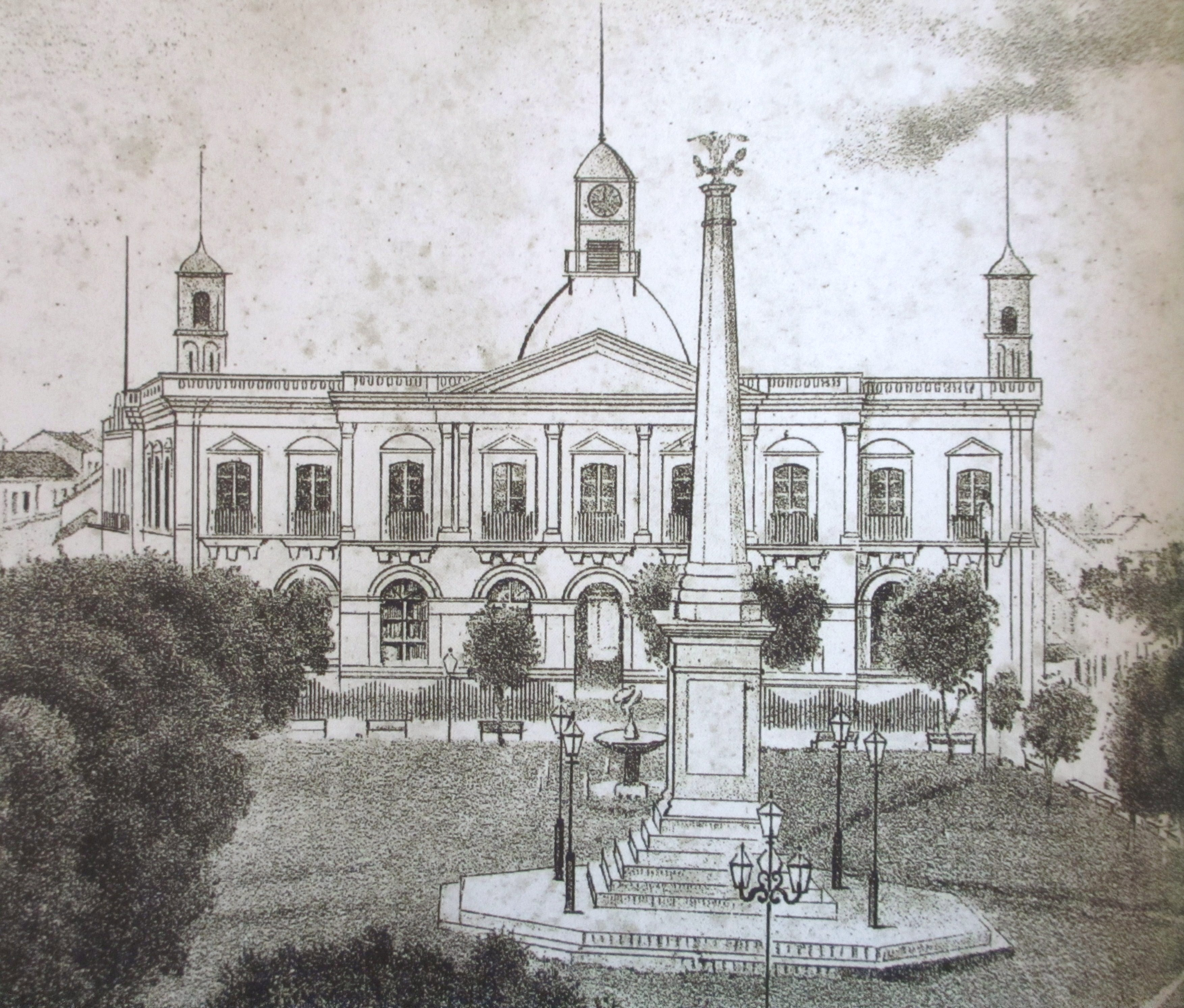 Recreación histórica del Palacio de Gobierno de Tabasco, México, el día de su inauguración el 13 de diciembre de 1894. Dibujo a tinta sobre cartón. Museo de Historia de Tabasco.